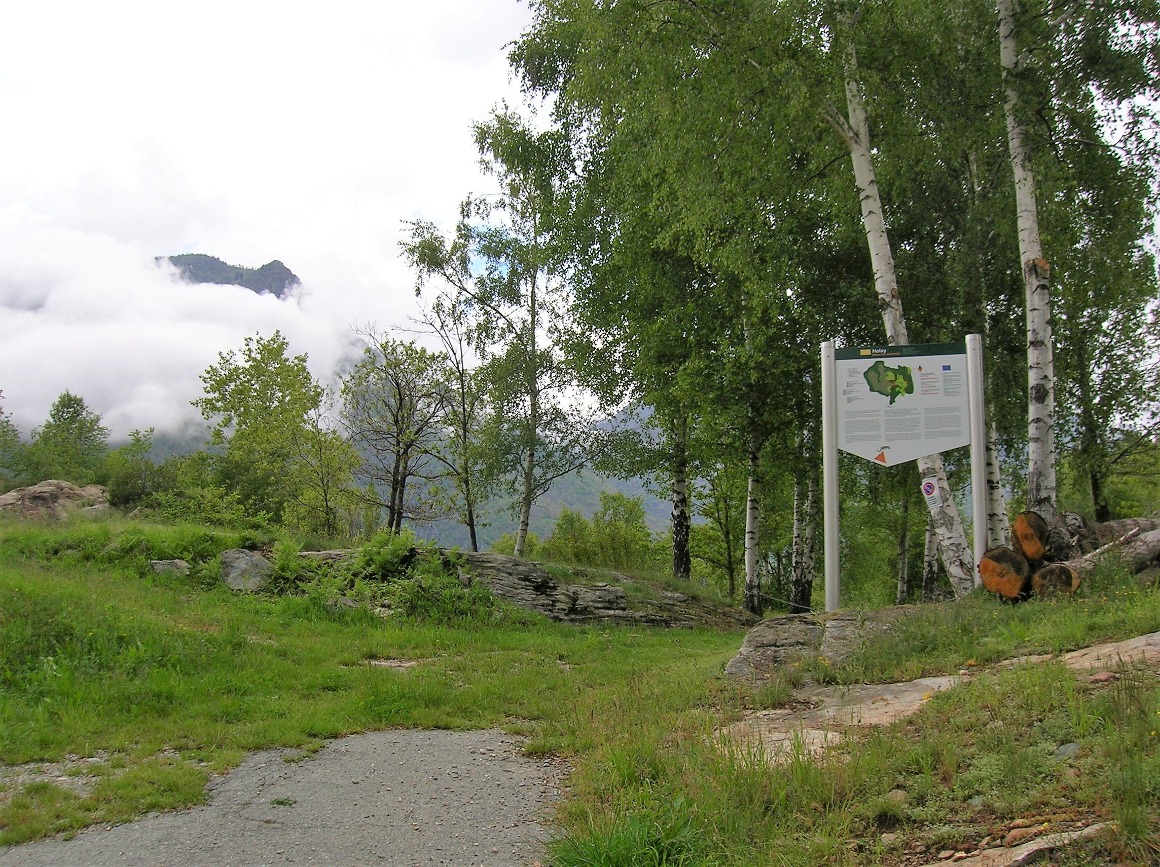 Riserva naturale stagno di Holay, Pont-Saint-Martin, Valle d'Aosta, Italia